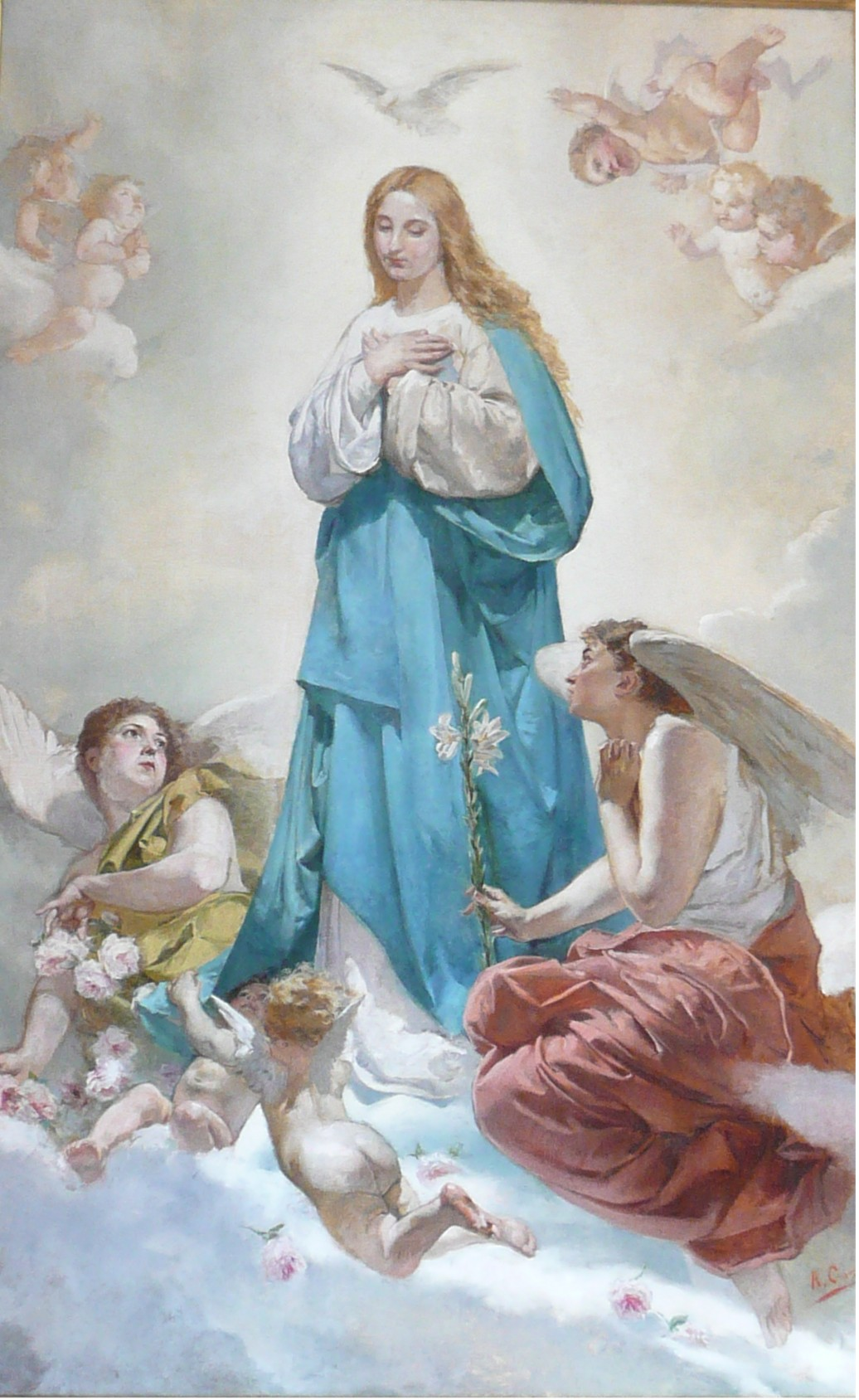 El óleo / lienzo, fué restaurado en el año 2008 por el equipo Trestaller de Valencia (España)